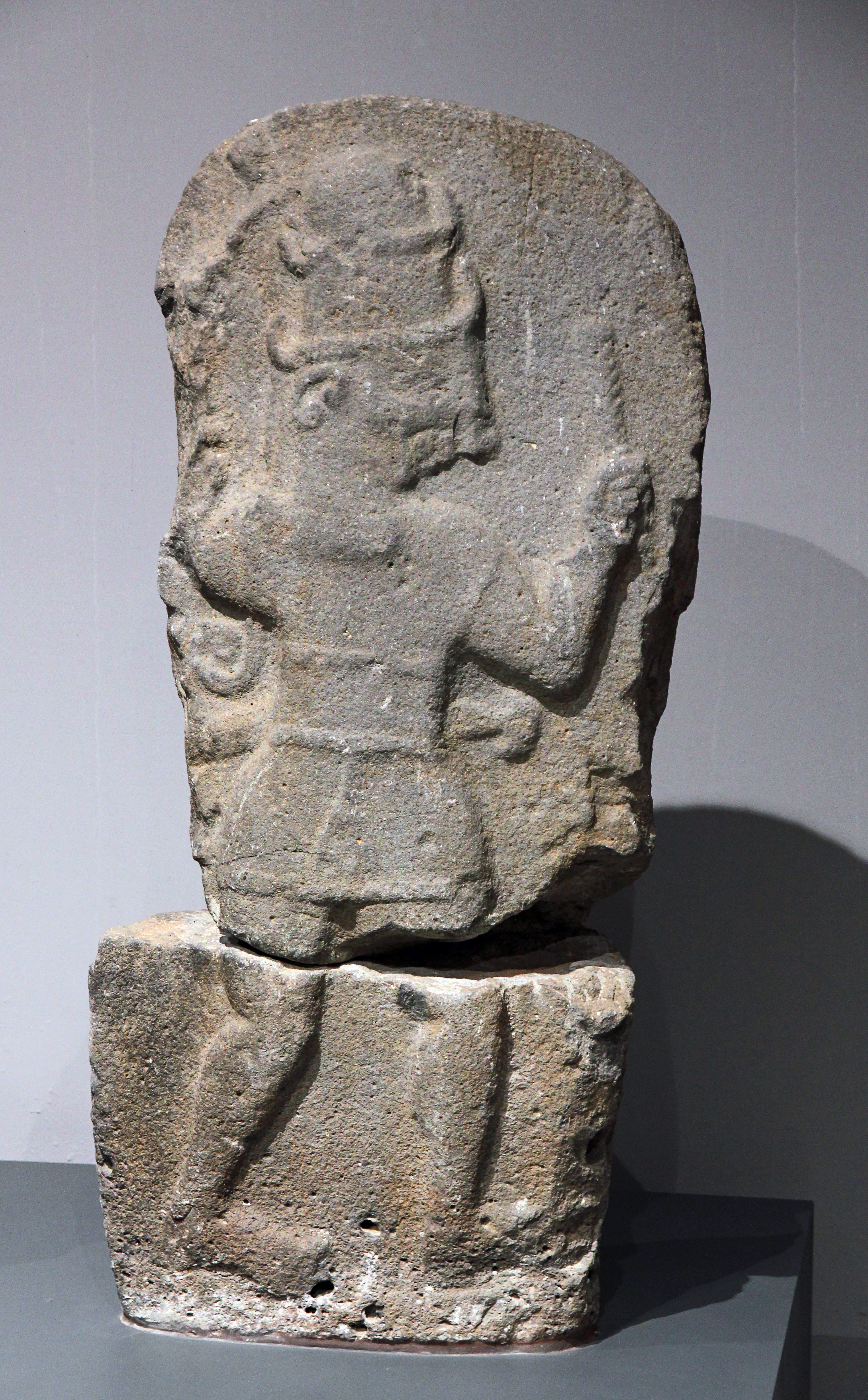 Archäologisches Museum Adana, Südtürkei, späthethitische Stele İslahiye 2